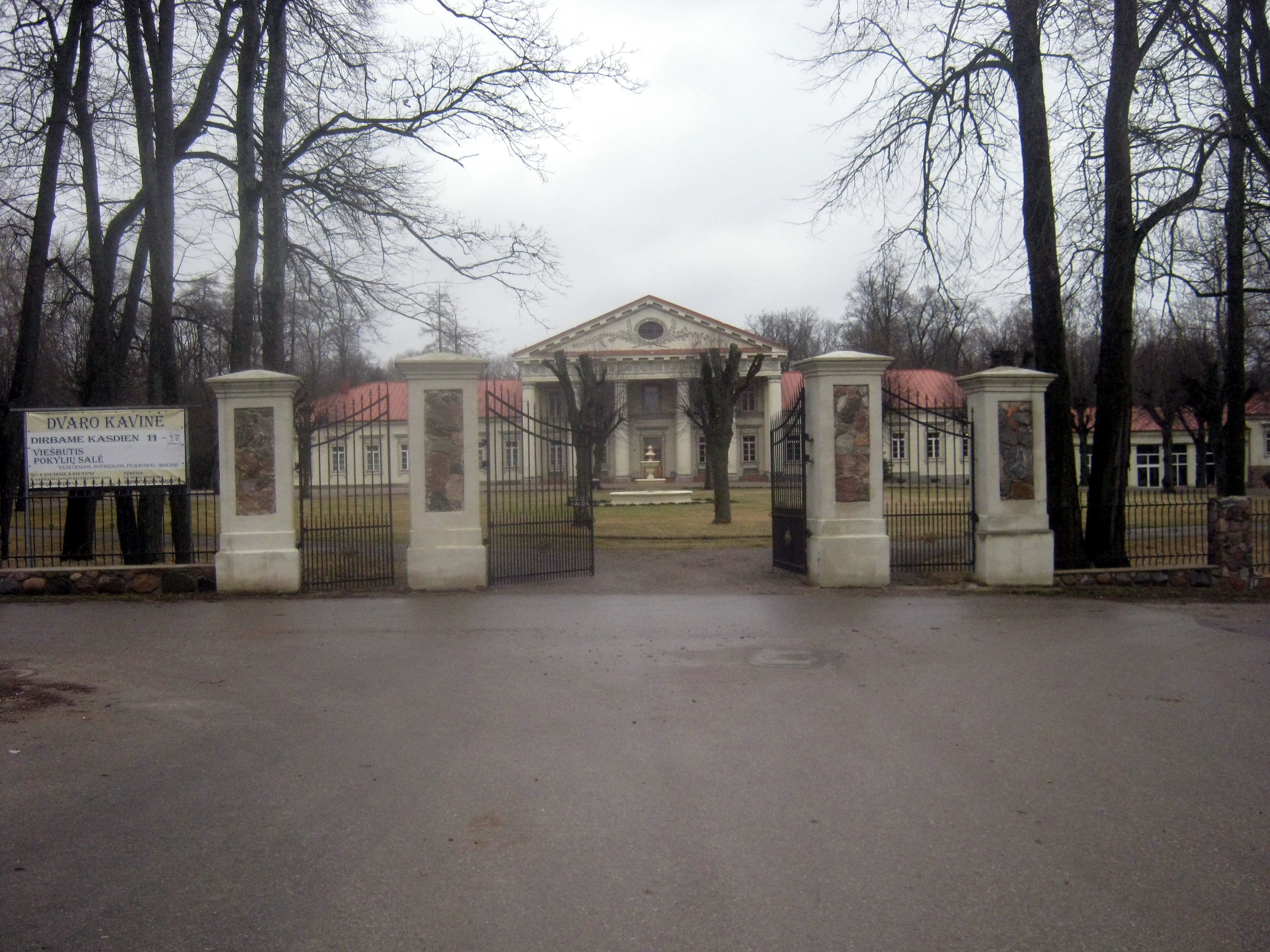 Taujėnai